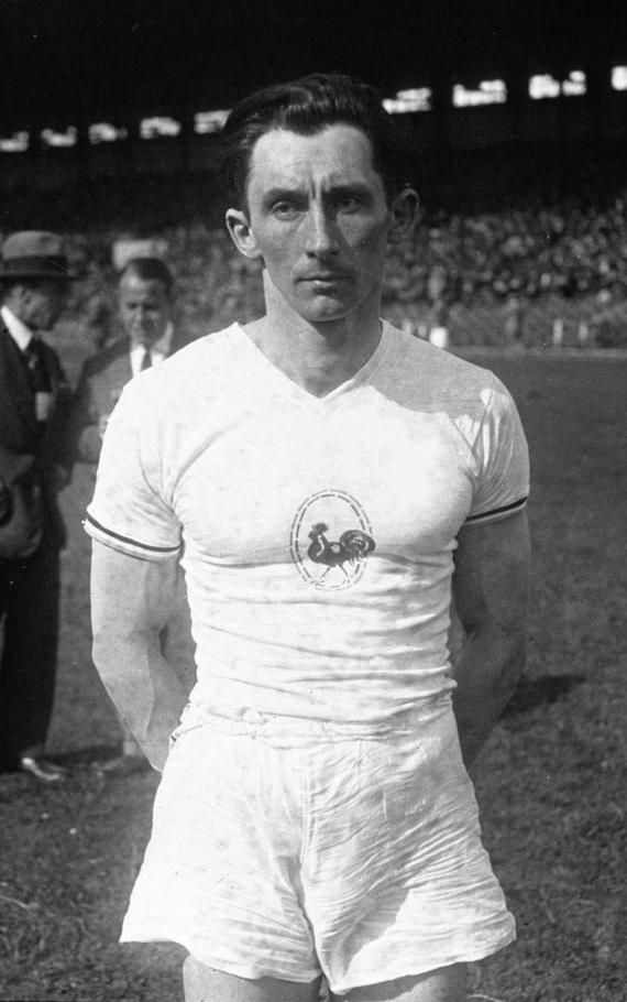 Colombes : match France-Italie-Suisse : Vautier (Fr.) : [photographie de presse] / Agence Meurisse